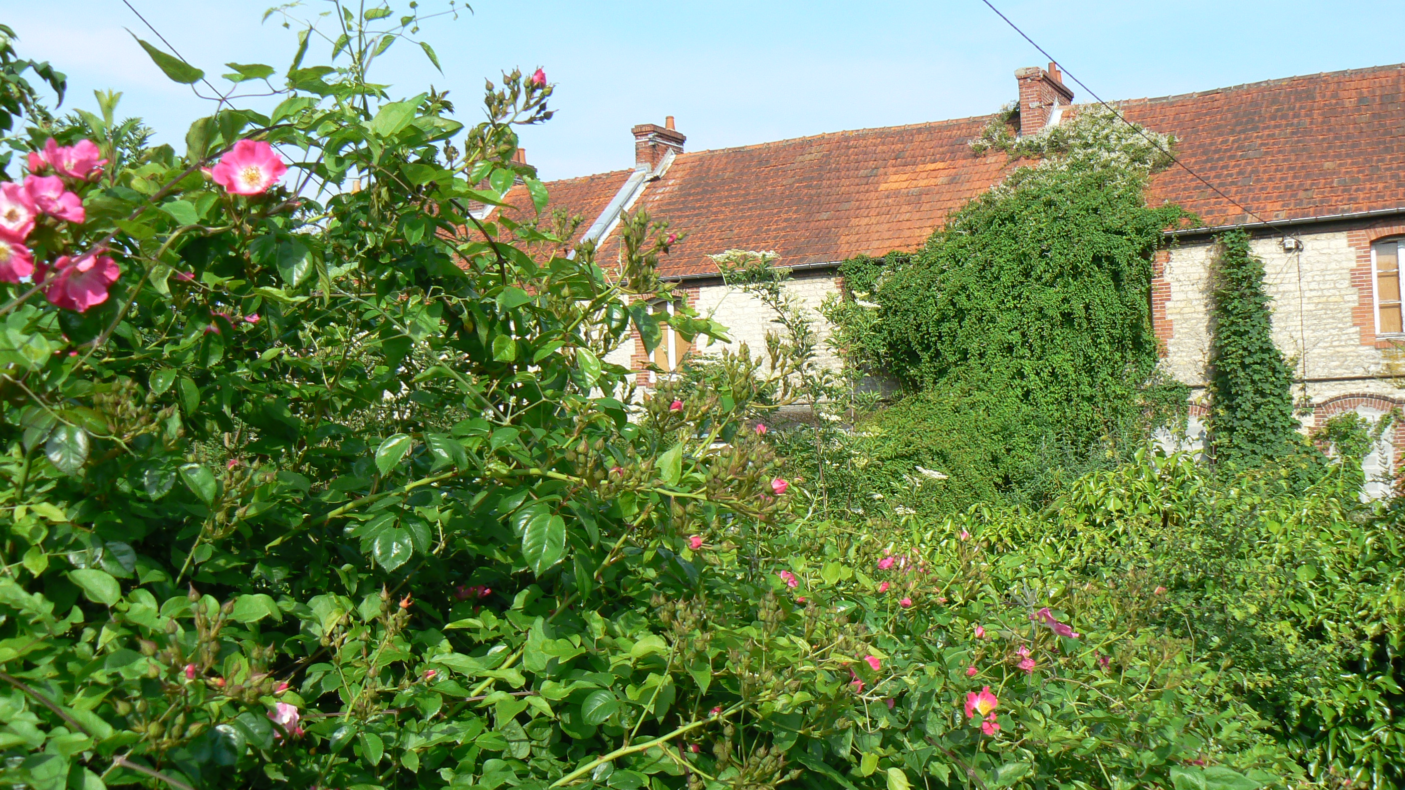 Cité-jardin des rosiers vue de la rue des rosiers (avec un rosier ancien au premier plan :-)))